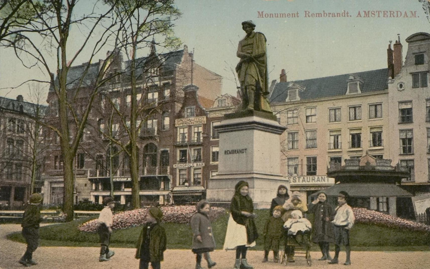 Beschrijving Standbeeld van Rembrandt op het Rembrandtplein Documenttype prentbriefkaart Vervaardiger Onbekend Anoniem Collectie Collectie Stadsarchief Amsterdam: prentbriefkaarten Datering 1912 ca. Geografische naam Rembrandtplein Inventarissen Afbeeldingsbestand PBKD00261000008